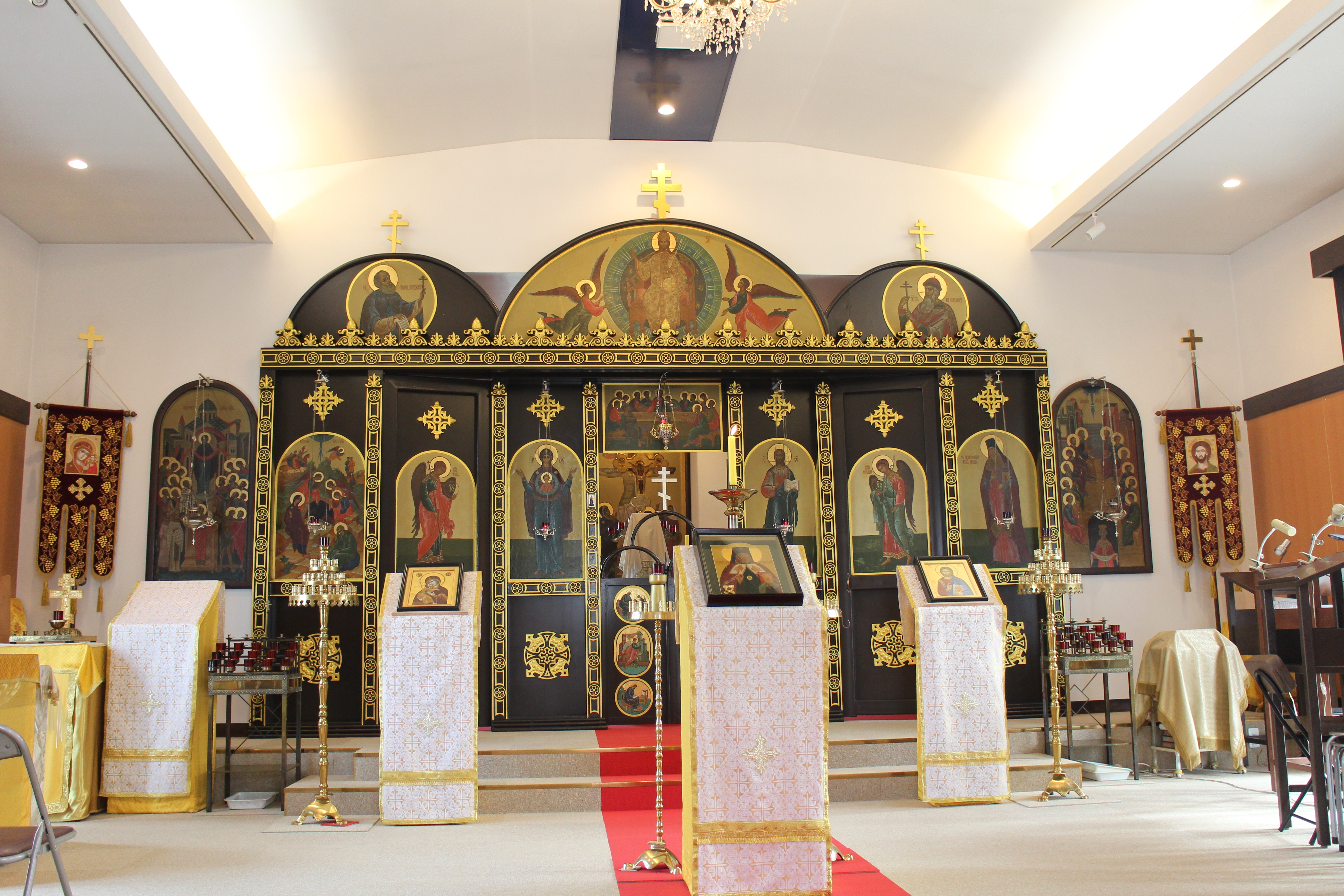 前橋ハリストス正教会。2019年11月28日撮影。